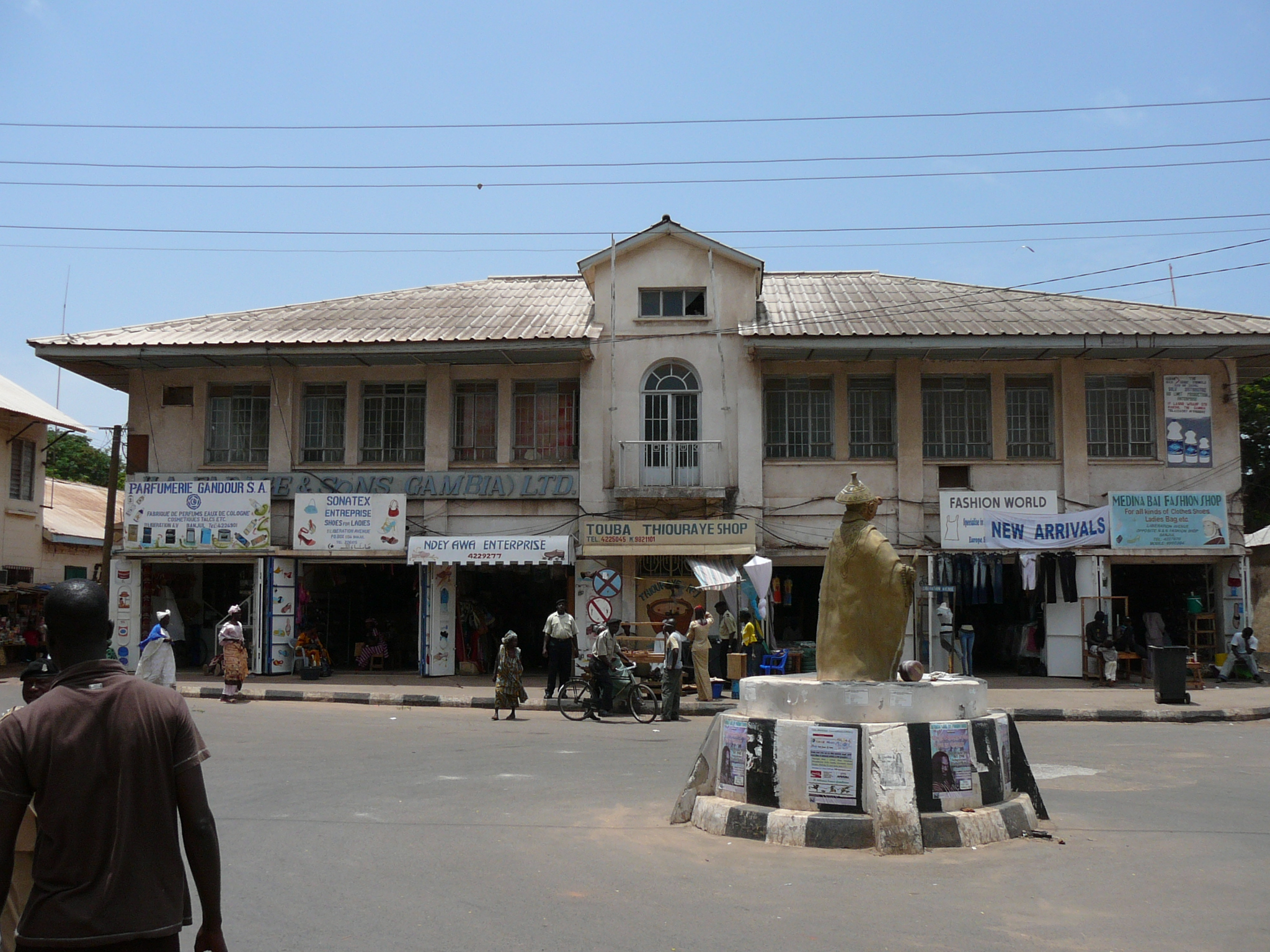 Straße in Banjul